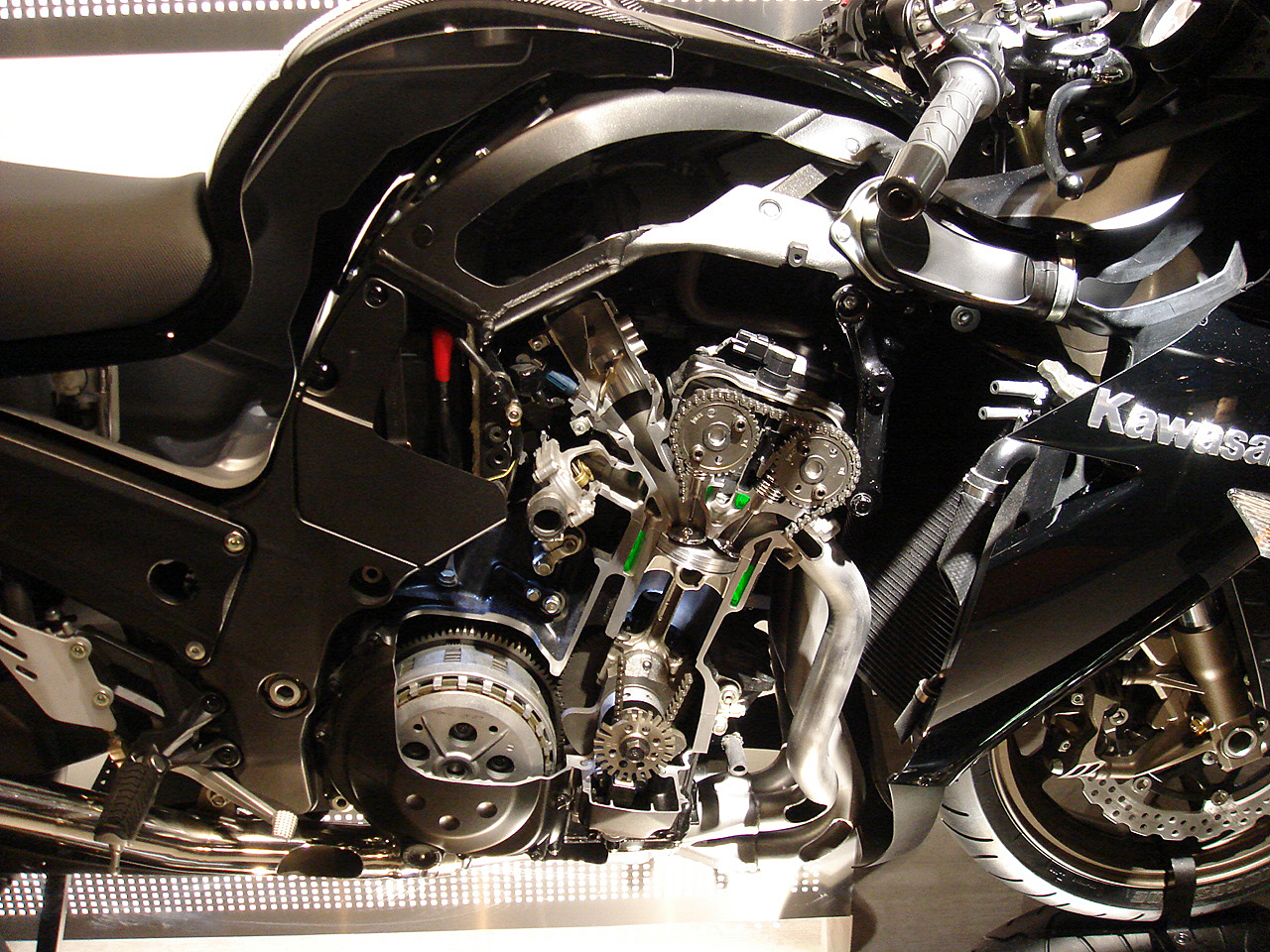 カワサキZZR1400（2006年）カットモデル カワサキワールドにて撮影